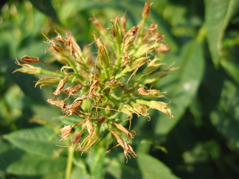 Früchte der Rispigen Flammenblume Phlox paniculata flav. Eva collum